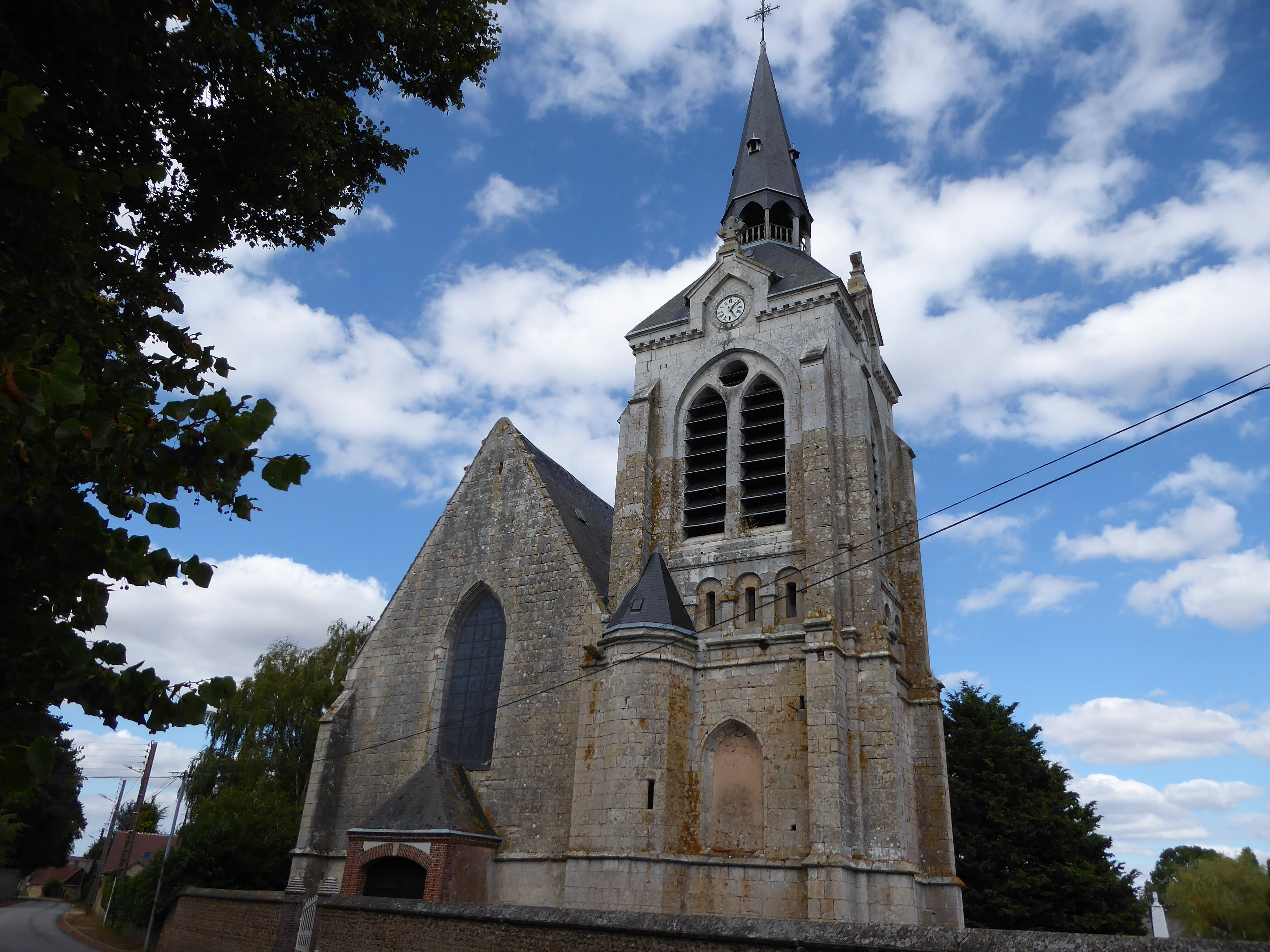 façade ouest de l'église Saint-Martin, Ollé, Eure-et-Loir, France.